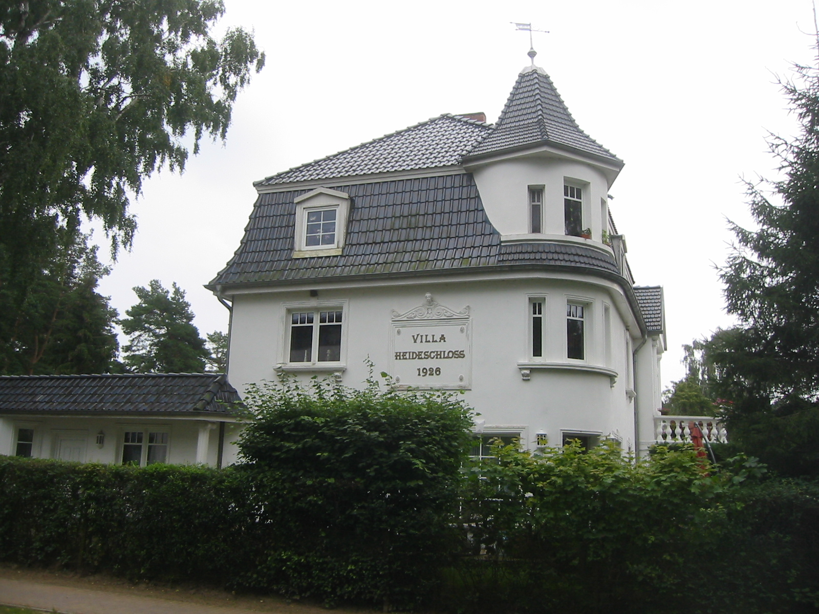 Villa "Heideschloss" aus dem Jahr 1926 in der Dünenstraße Ecke Cäcilienstraße in Lubmin, einer Gemeinde im Landkreis Ostvorpommern